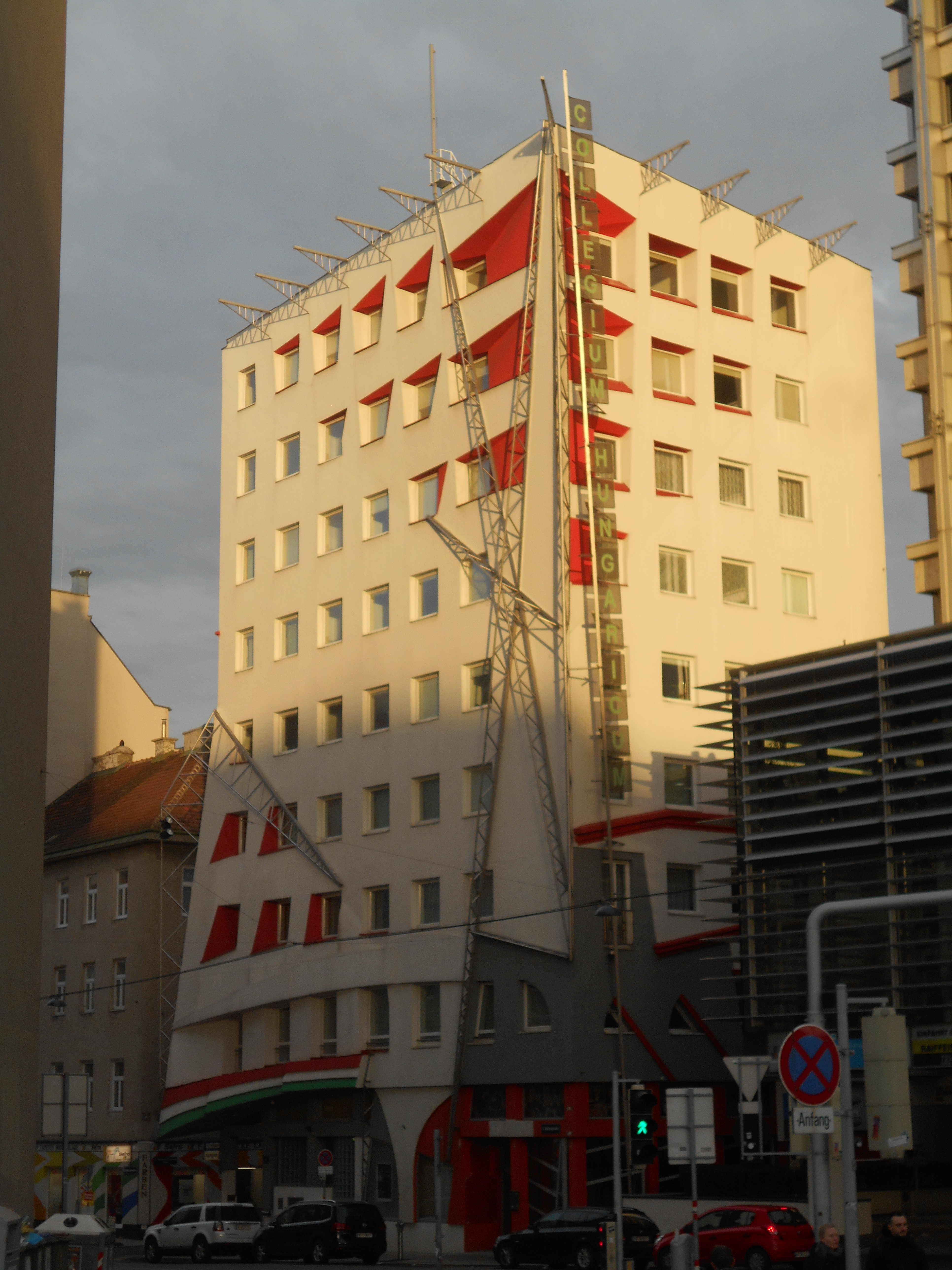 Das Collegium Hungaricum (Ungarisches Kulturinstitut) in der Hollandstraße 4. Das ursprünglich 1963-1965 errichtete Gebäude wurde 1998/99 komplett umgebaut und erhielt dabei sein heutiges Aussehen in Anlehnung an die konstruktivistische Architekturtradition.